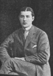 Карл-Бронислав Генрихович Свенцицкий, прапорщик, сын члена Гос. Думы Г. И. Свенцицкого.